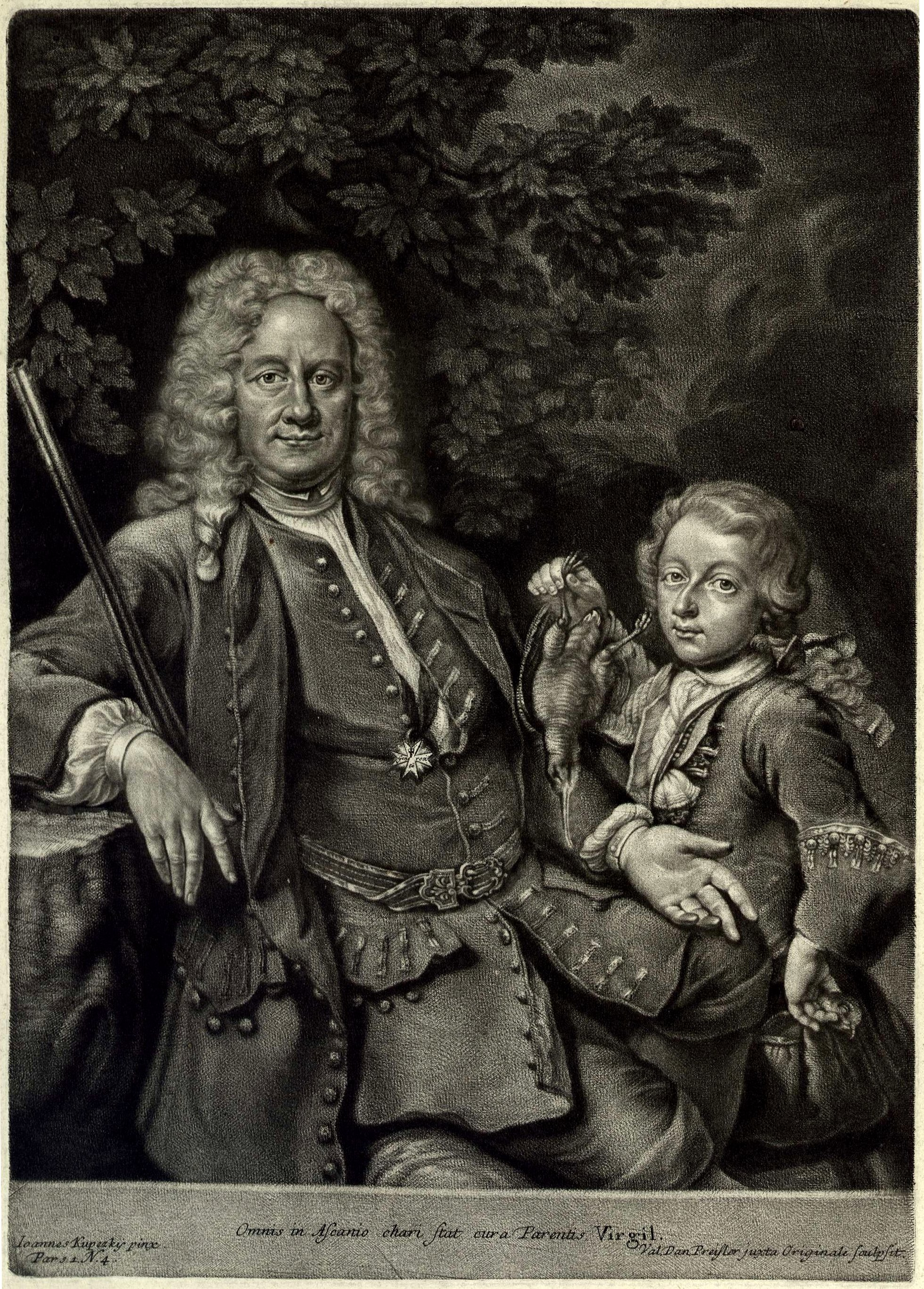 Car. Bened. Geuder, ab Heroldsberg Castri Imperalis Norib. Praetor, cum filio eius Adam Rudolph. Carl Carl Benedikt Geuder von Heroldsberg (1670–1744), Kaiserlicher Rat, Kronhüter und Verwahrer der Reichskleinodien, mit Sohn Johann Adam Rudolph Carl (1718–1789). Kupferstiche von Bernhard Vogel, nach Gemälden von Johann Kupetzky. Herausgegeben Nürnberg 1745.